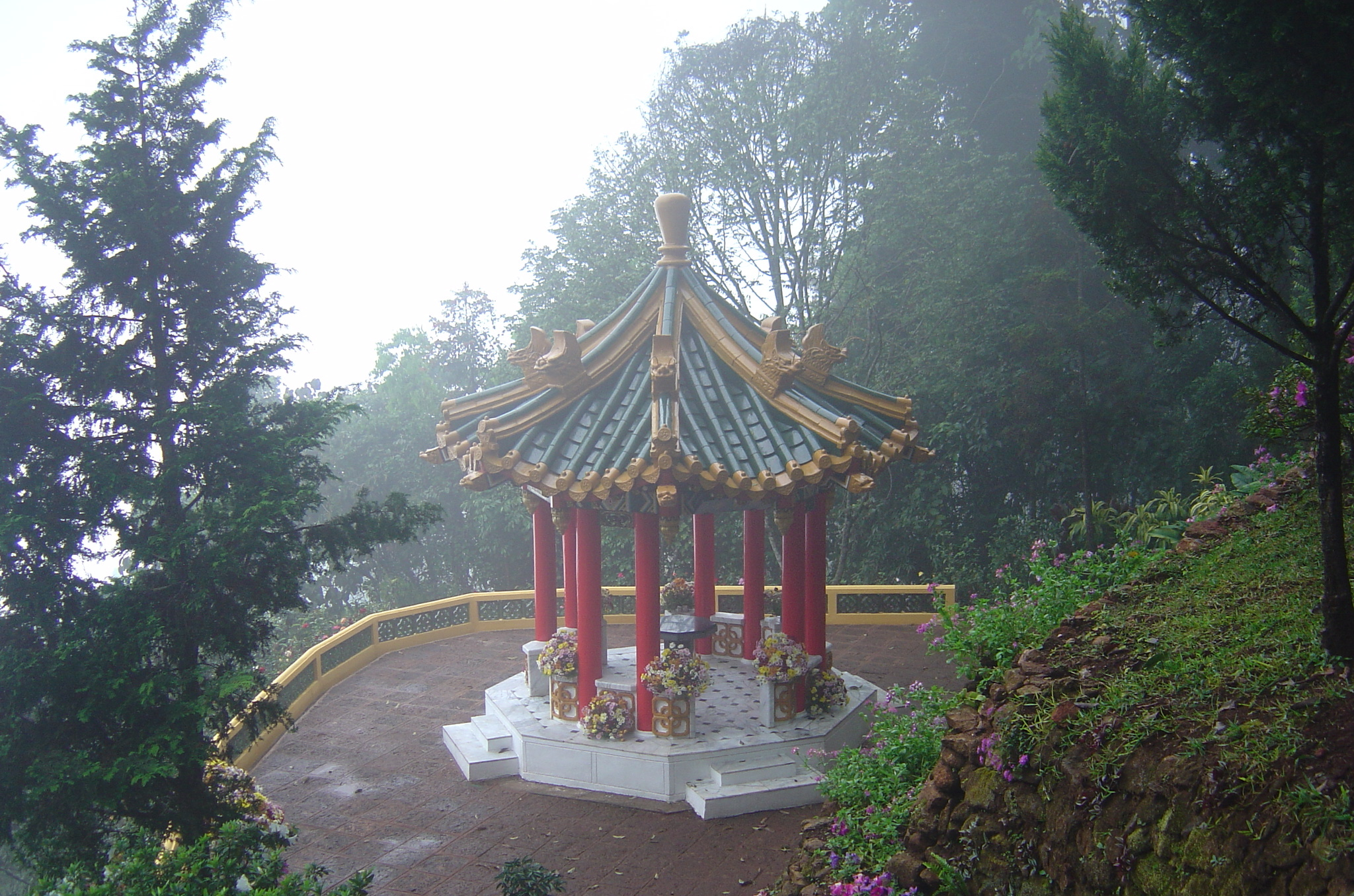 เก๋งจีน เปรียบเสหมือนสัญลักษณ์ของสวนแสนแสน